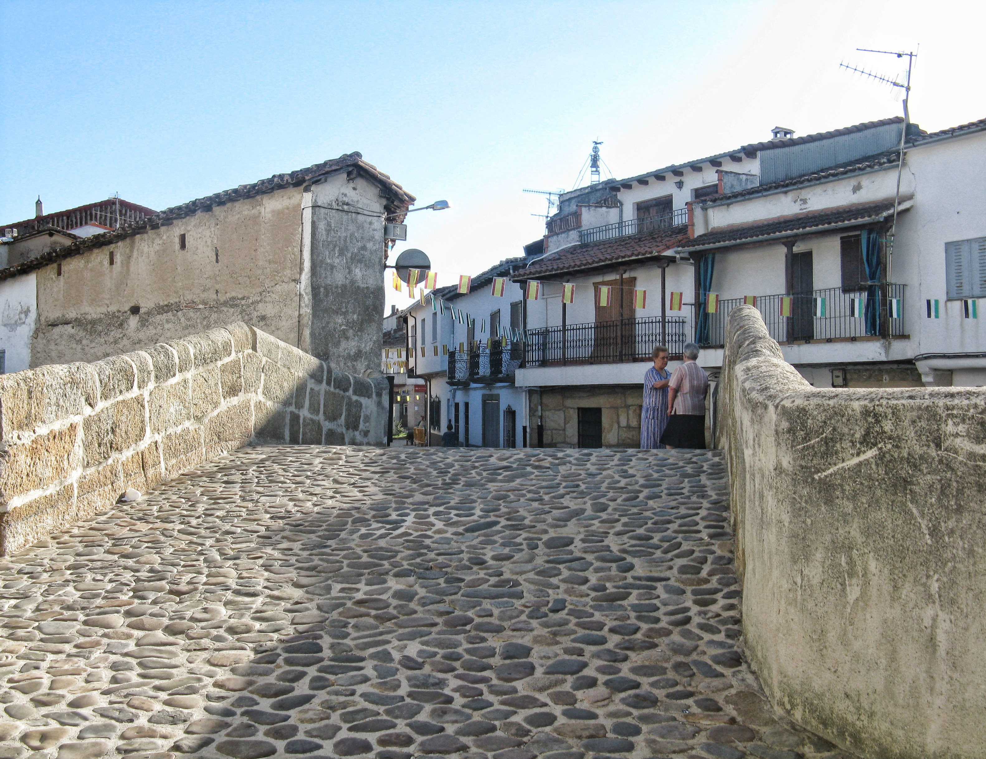 Puente sobre la Garganta de la Buitrera en la calle Severiano Masides, Aldeanueva del Camino, provincia de Cáceres, España